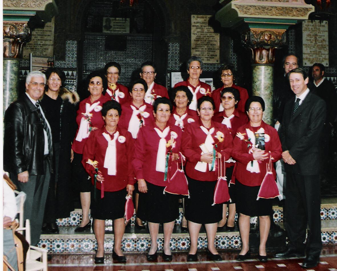 Grupo Coral Feminino " As Papoilas " de Santo Aleixo da Restauração Autor: Ana Maria Moreno Actuação na Casa do Alentejo, Lisboa no Verão de 2005